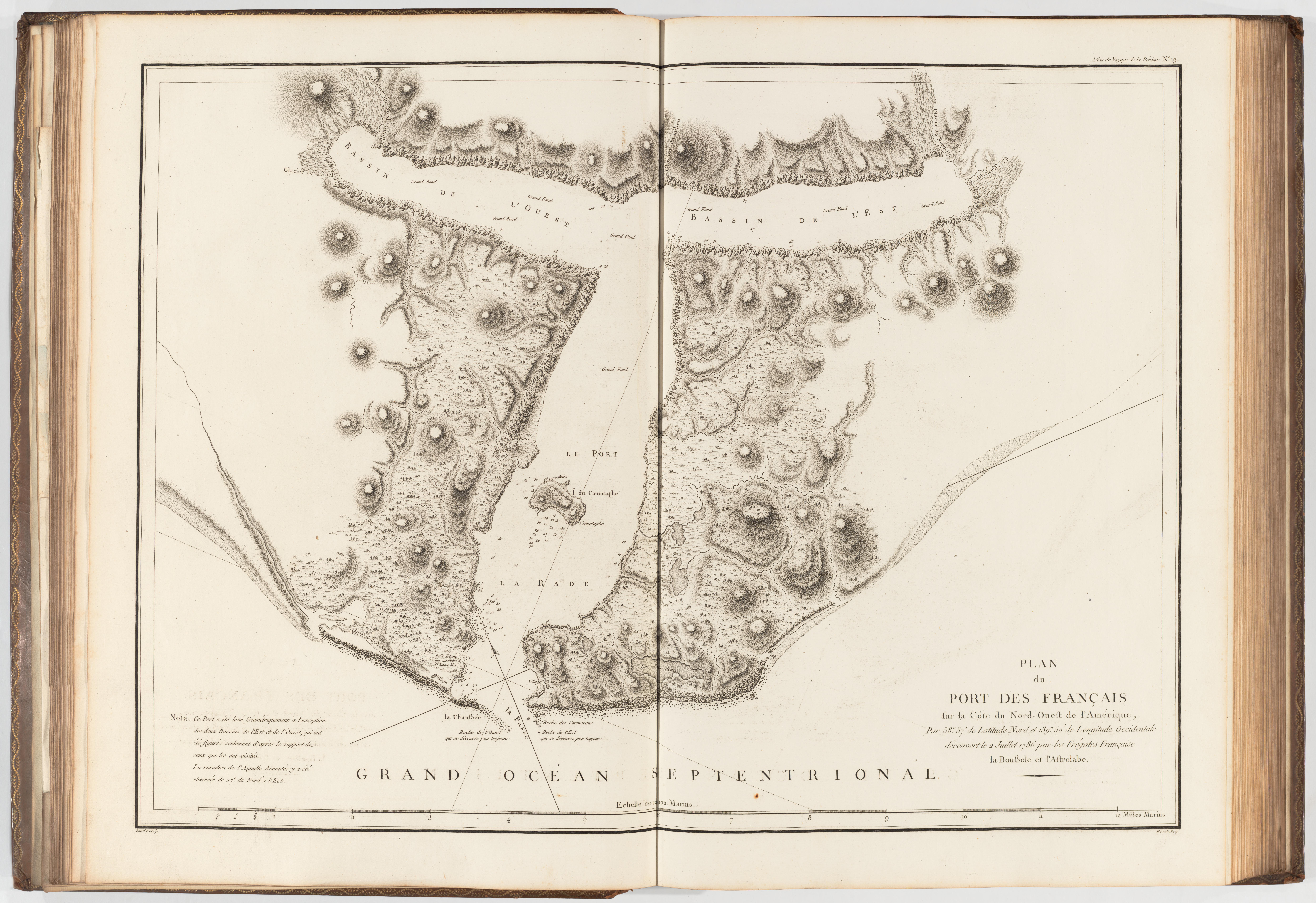 Voyage de La Pérouse autour du monde /publié conformément au décret du 22 avril 1791, et rédigé par L.A. Milet-Mureau.